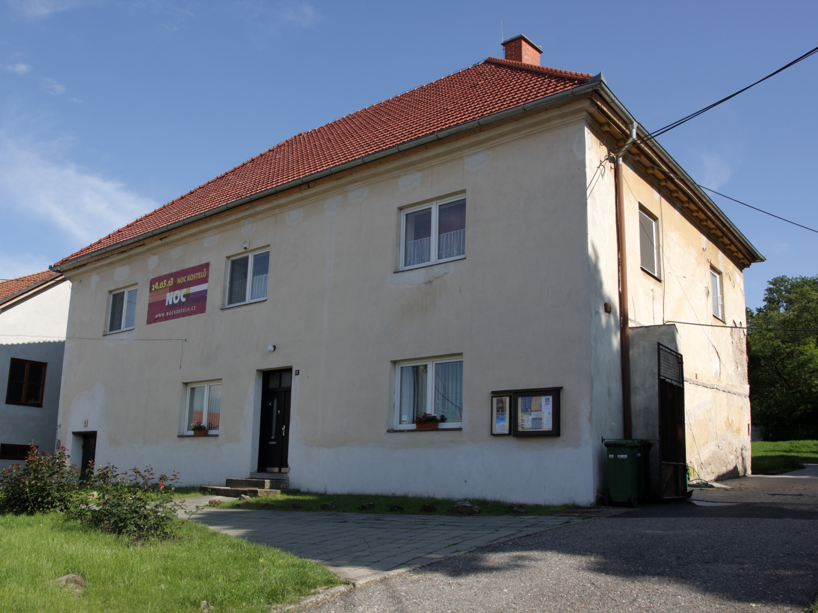 Blučina - římskokatolická fara.